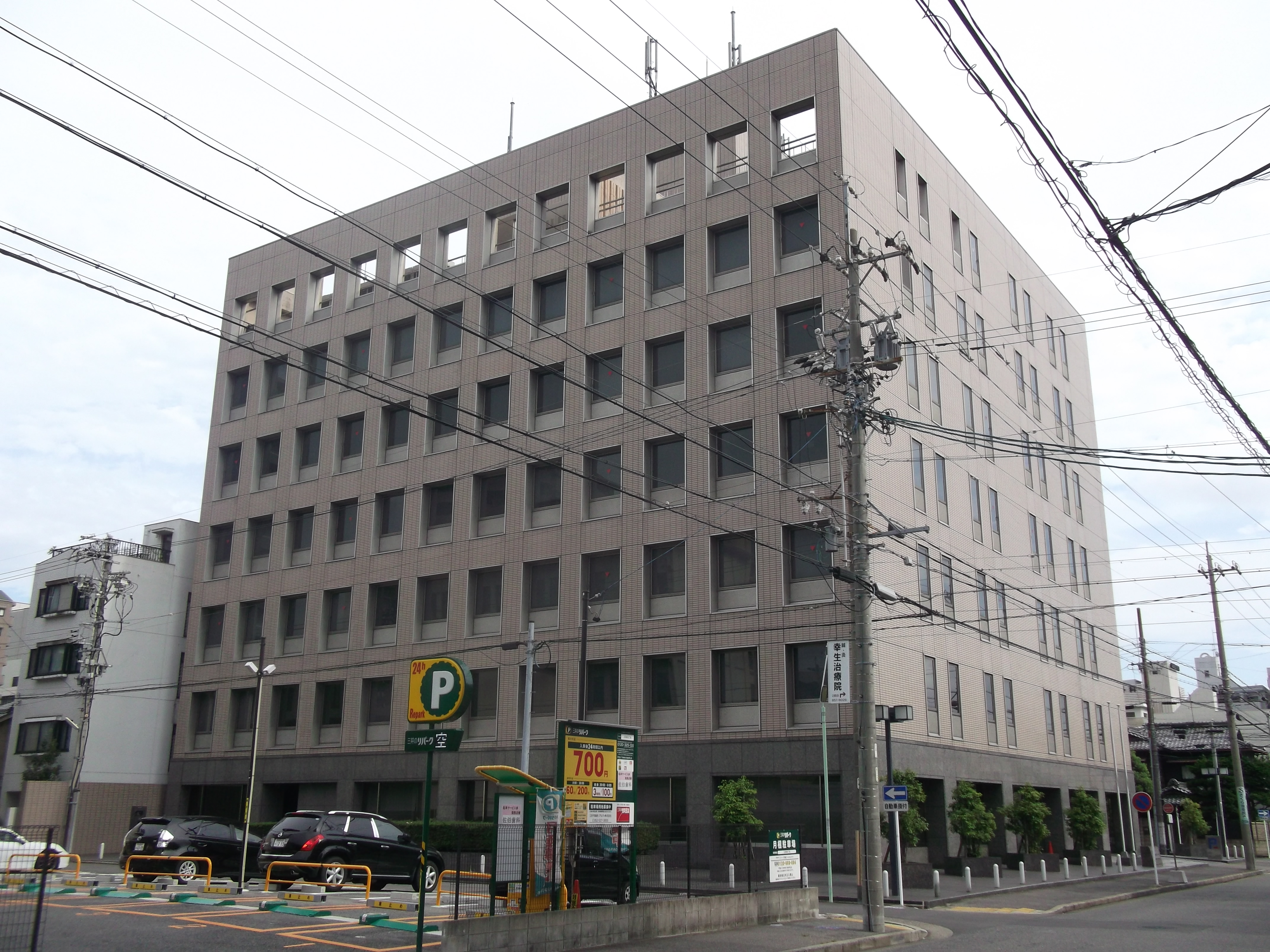 名古屋市瑞穂区洲雲町のシーテック本社を西側公道北側より撮影